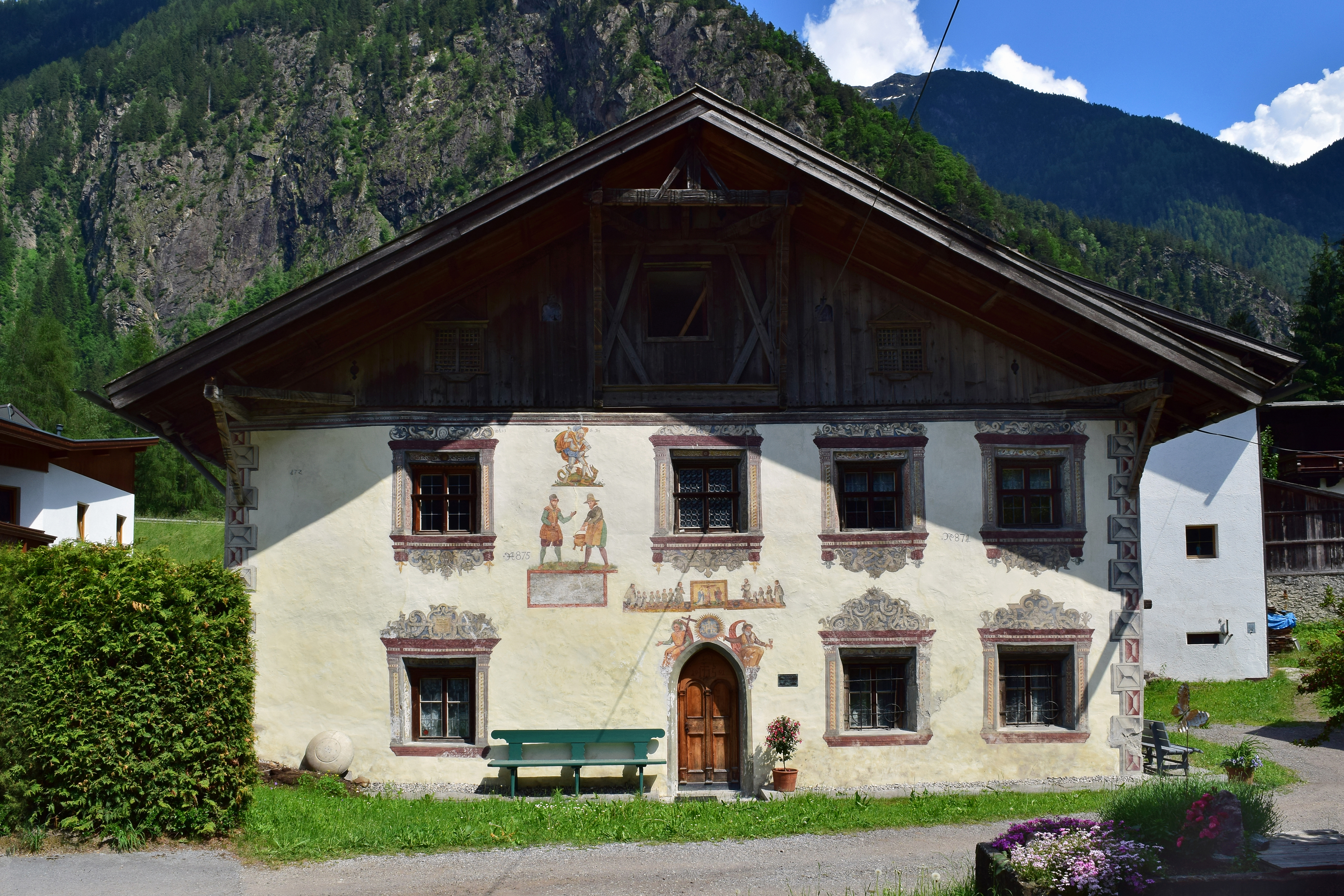 In dem Paarhof wurde 1599 die erste Glocke der Glockengießerei Grassmayr gegossen und damit der Grundstein für die heutige Firma gelegt, die 1836 nach Innsbruck übersiedelte. Das zweigeschoßige, gemauerte Mittelflurhaus besitzt einen geschnitzten Bundwerksgiebel und Eckquaderung. Die Fenster sind mit Pilastern, Gebälk und Rollwerkornamenten umrahmt. Das Portal wird von einer Frau und einem Mann umrahmt, darüber sind eine Kreuzigung und Stifterfiguren sowie zwei Glockspeisträger und der hl. Georg zu sehen. Die Fassadenmalereien sind mit „AE 1633“ bezeichnet.